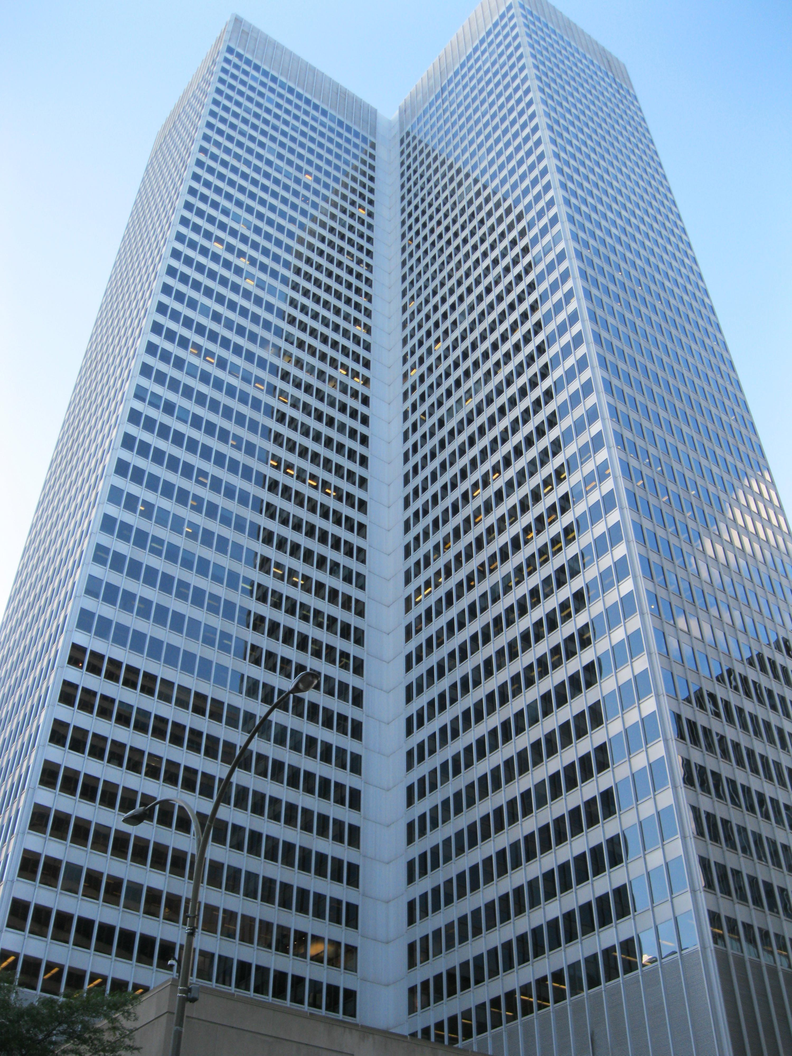 Place Ville-Marie, Montréal